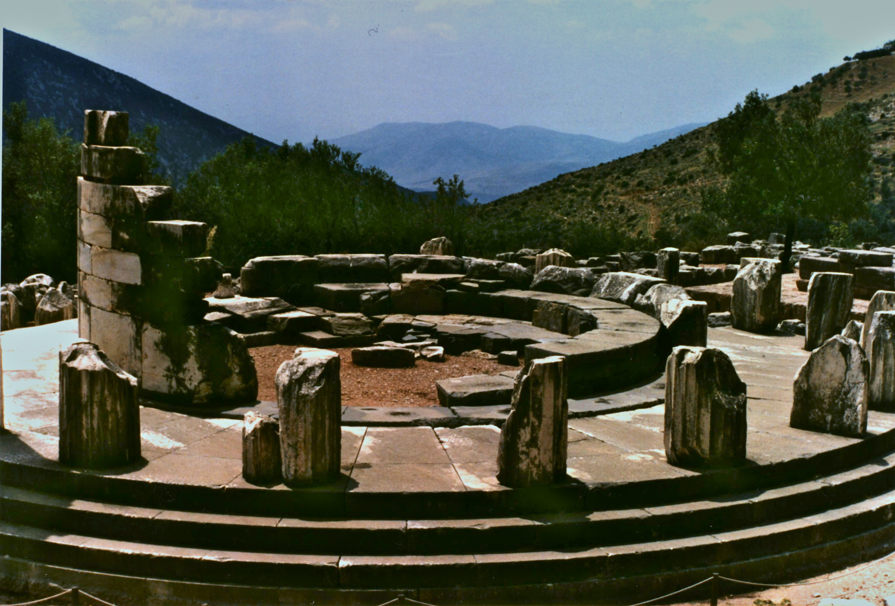 Θόλος της Αθηνάς Προναίας«Θόλος της Αθηνάς Προναίας»